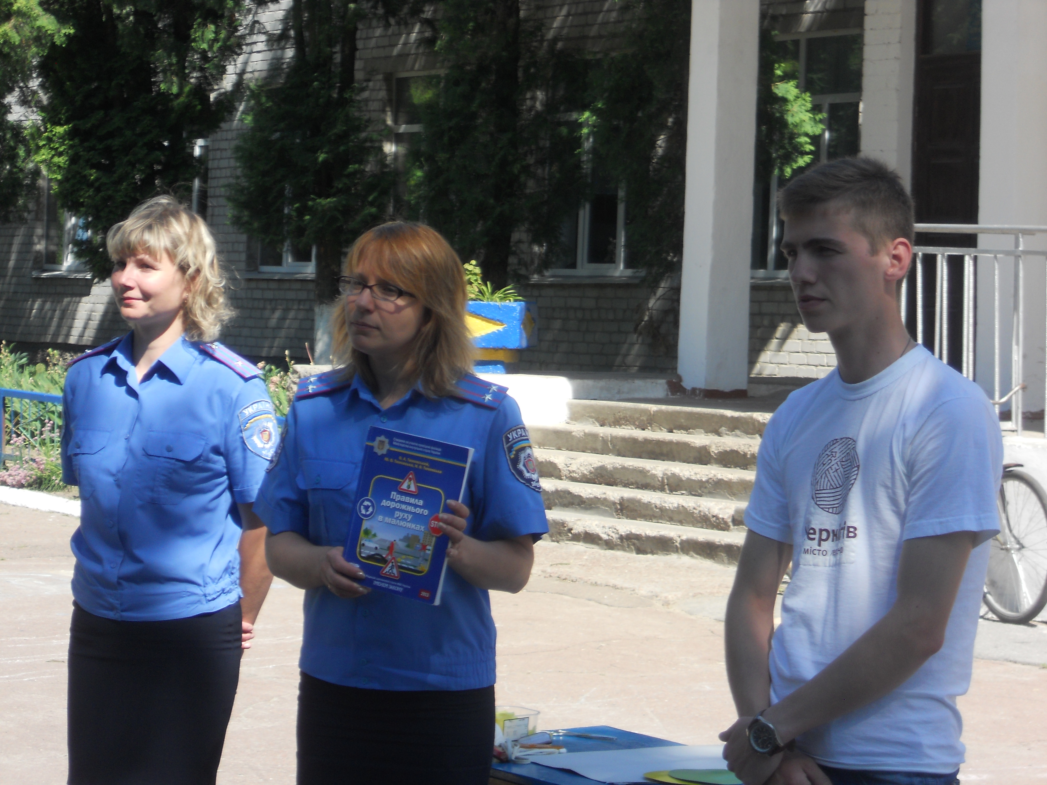 Чернігівське ДАІ проводить день безпеки руху в с. Новий Білоус Чернігівської області